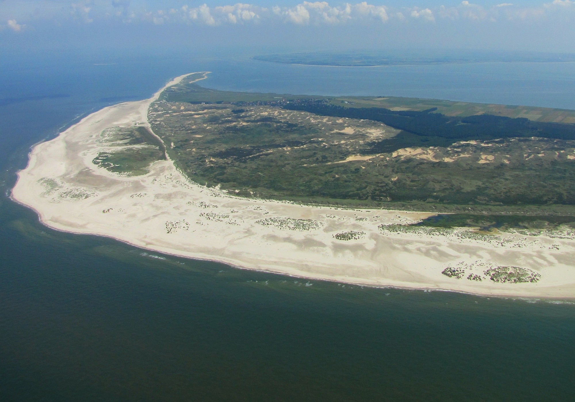 Luftbild vom Norden der Insel Amrum mit Gemeinde Norddorf und Naturschutzgebiet NSG Odde - Ansicht von Westen - Nordsee-Insel Kreis Nordfriesland, Schleswig-Holstein – zwischen dem Strand vorne (Kniepsand) und dem Wald befinden sich die Flächen des Naturschutzgebiets „Amrumer Dünen“